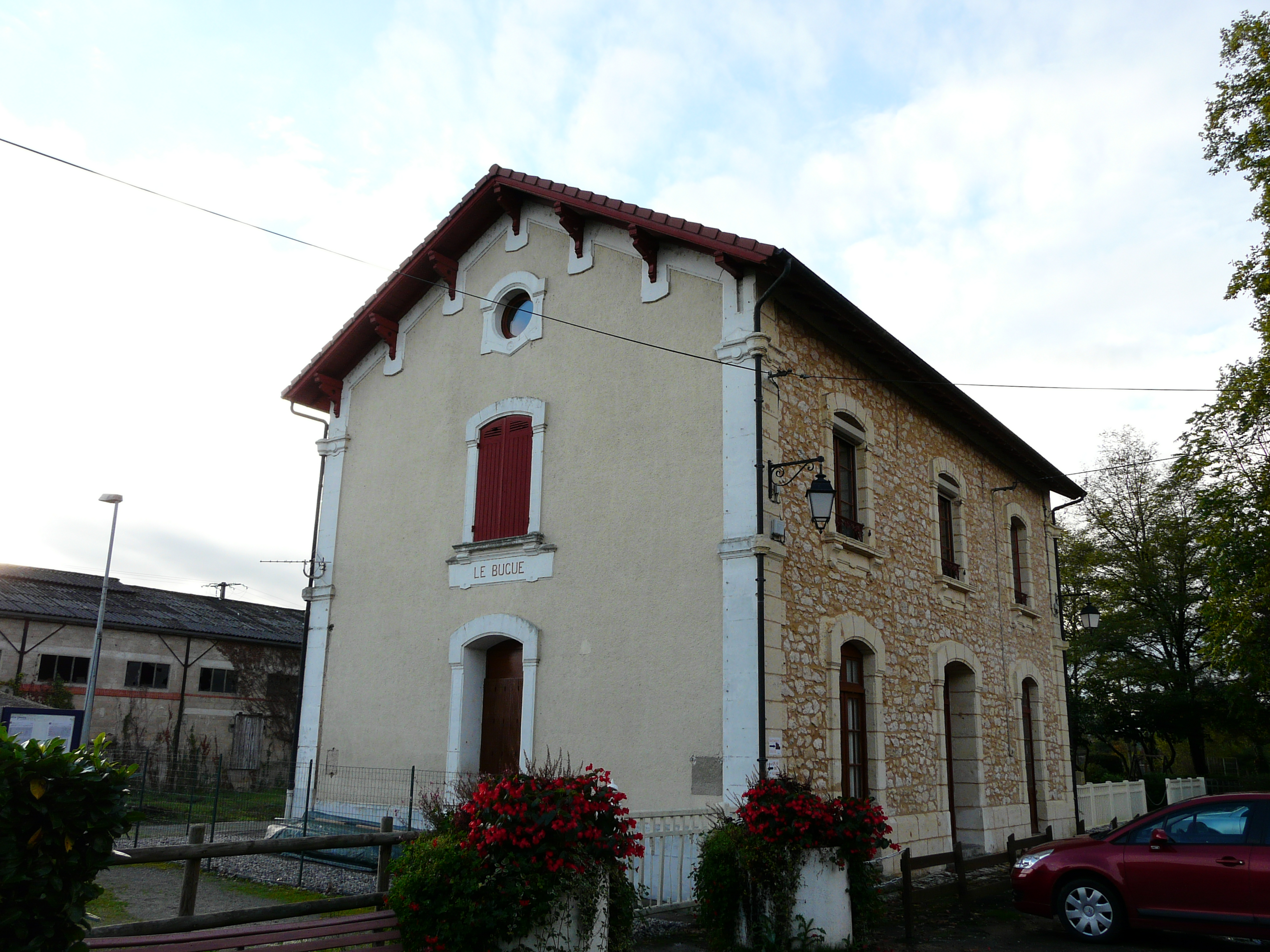 La gare du Bugue, Le Bugue, Dordogne, France.